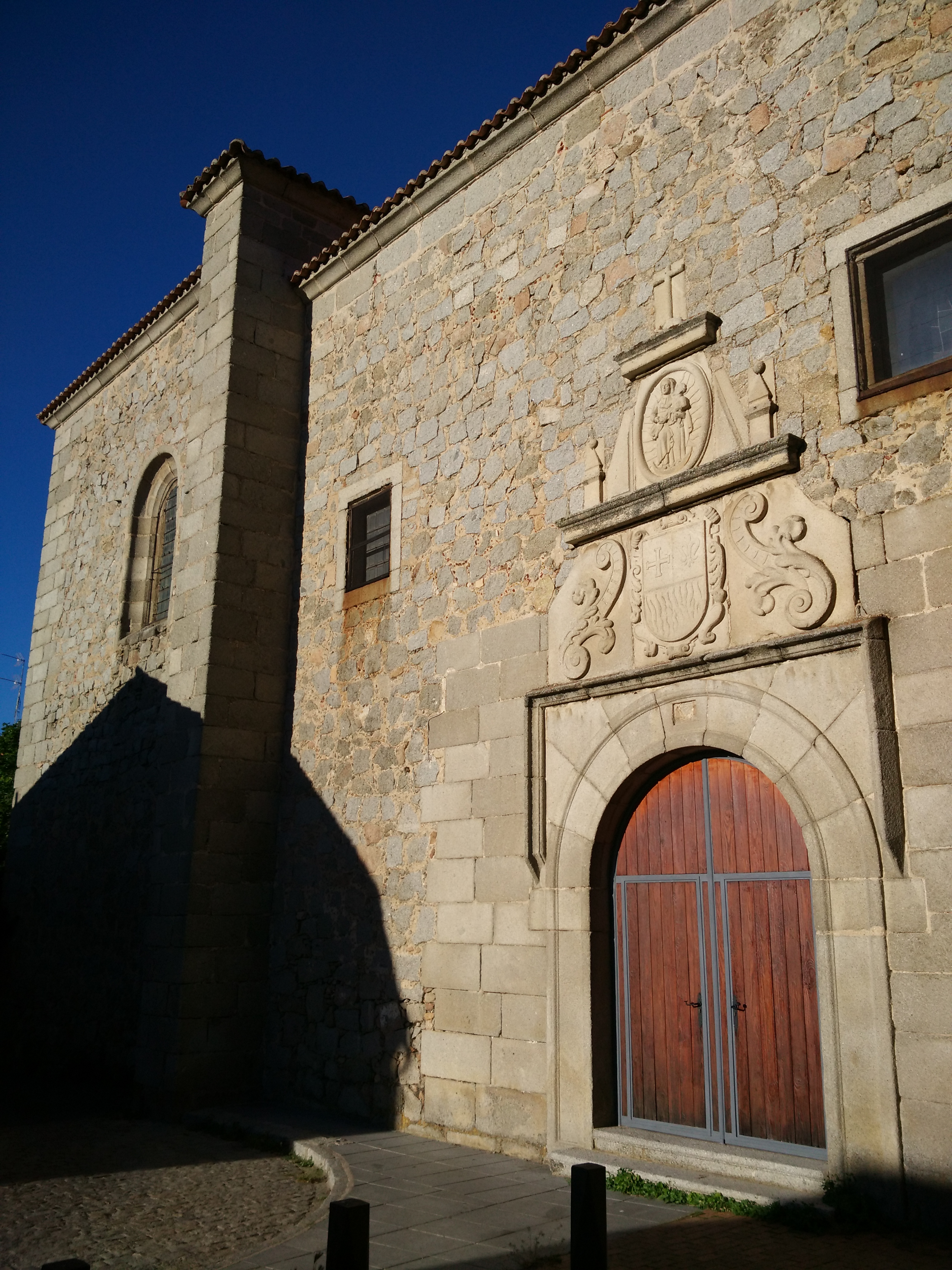 Portada de la iglesia de San Juan de la Cruz - antigua inclusa (situada en la ciudad de Ávila)